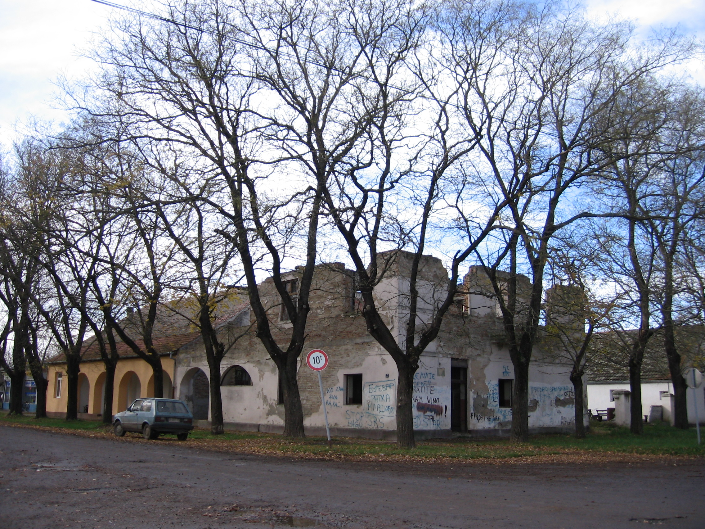 ruines of Cooperativa (Zadruga) from Communistic time in center of Banatsko Višnjićevo in Vojvodina